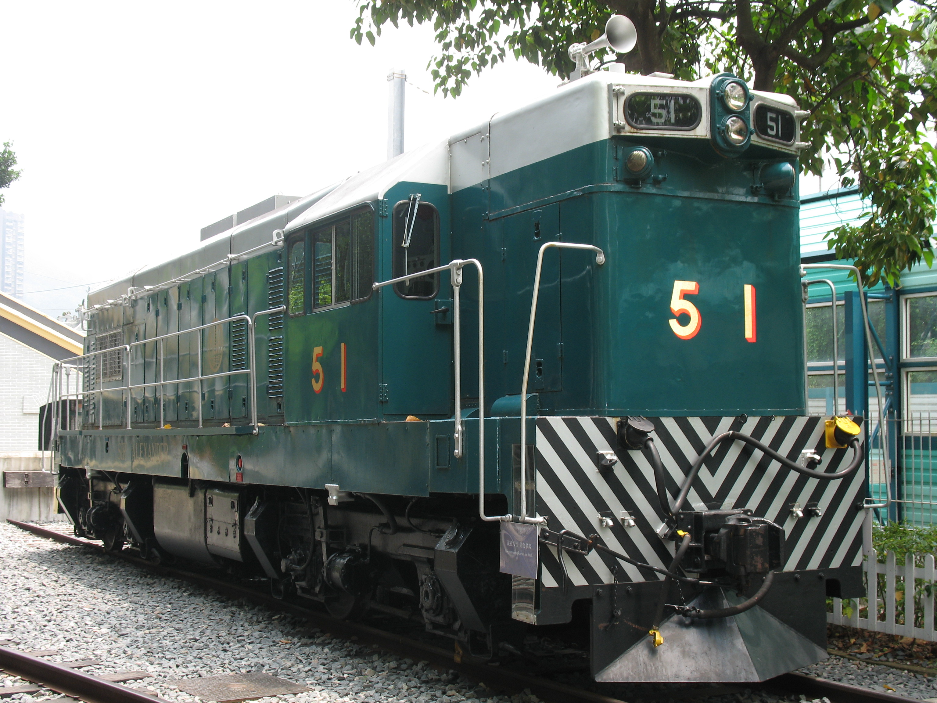 香港鐵路博物館藏品 SIR ALEXANDER 51號柴油電動機車